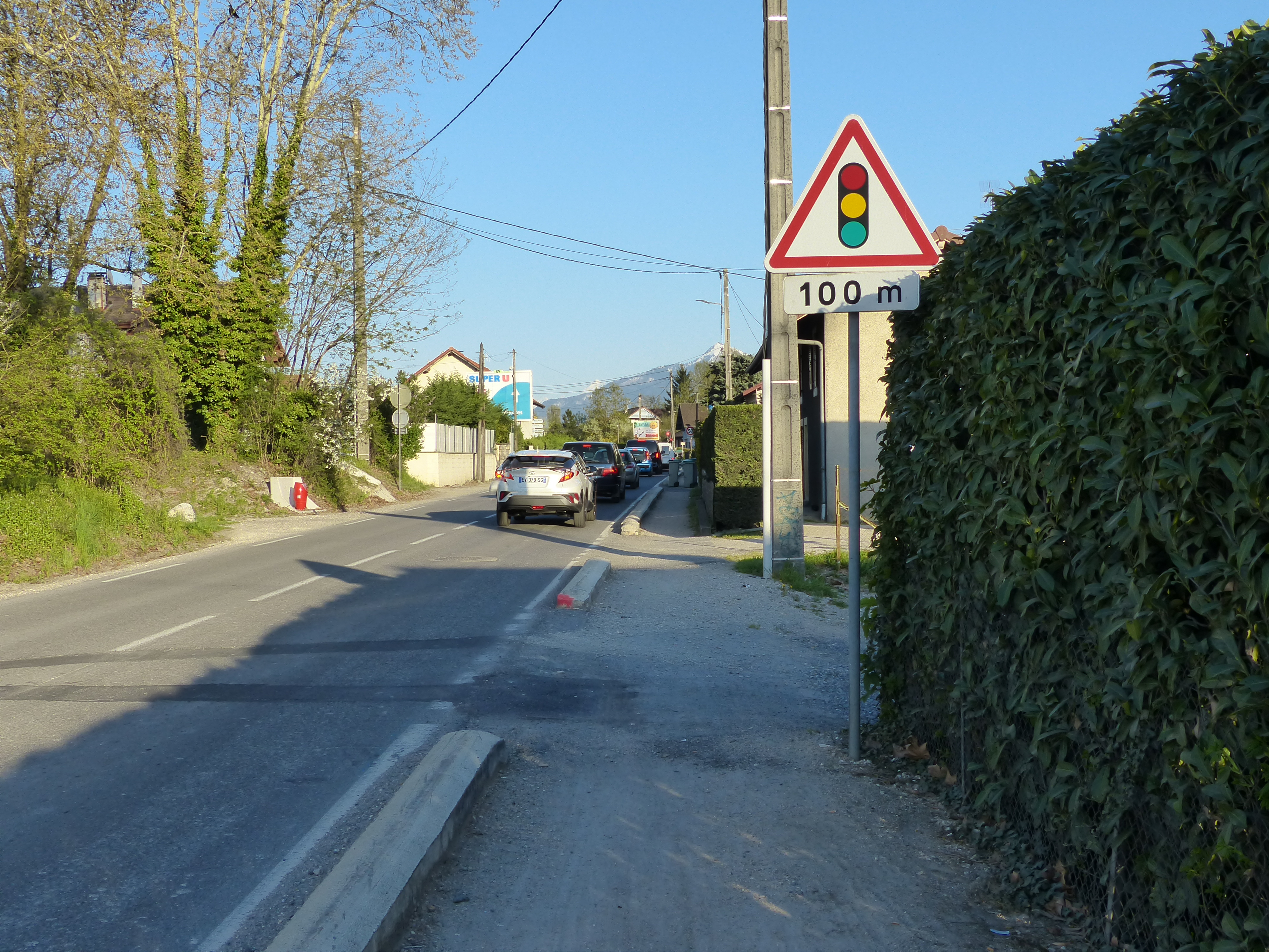 Panneau A17 et panonceau M1, route de Taninges, Vétraz-Monthoux, Haute-Savoie, France.